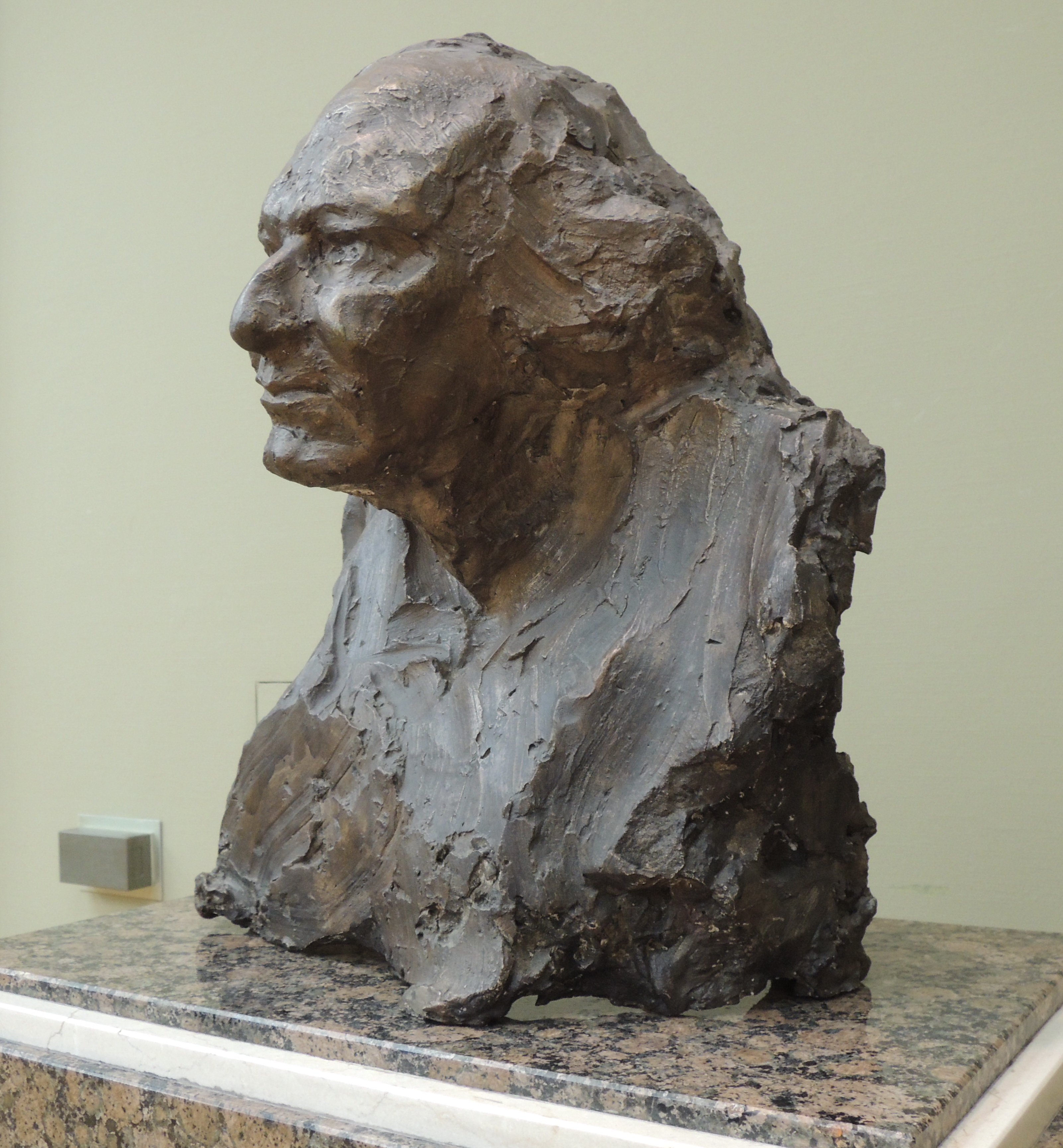 Вячеслав Иванов